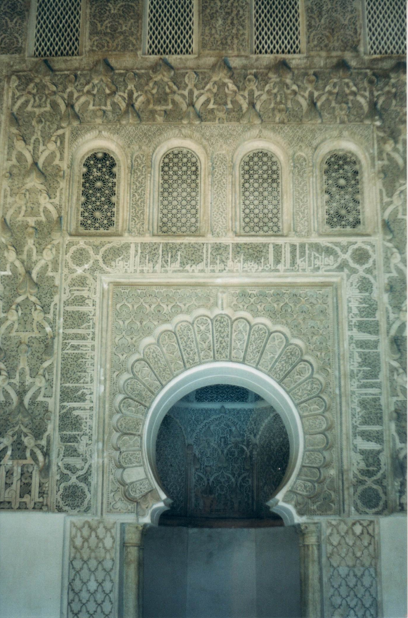 Tombe Sadiane, Marrakech, Marocco. Ingresso ad un mausoleo.